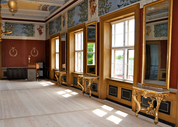 Øverste sal på Gyldenholm